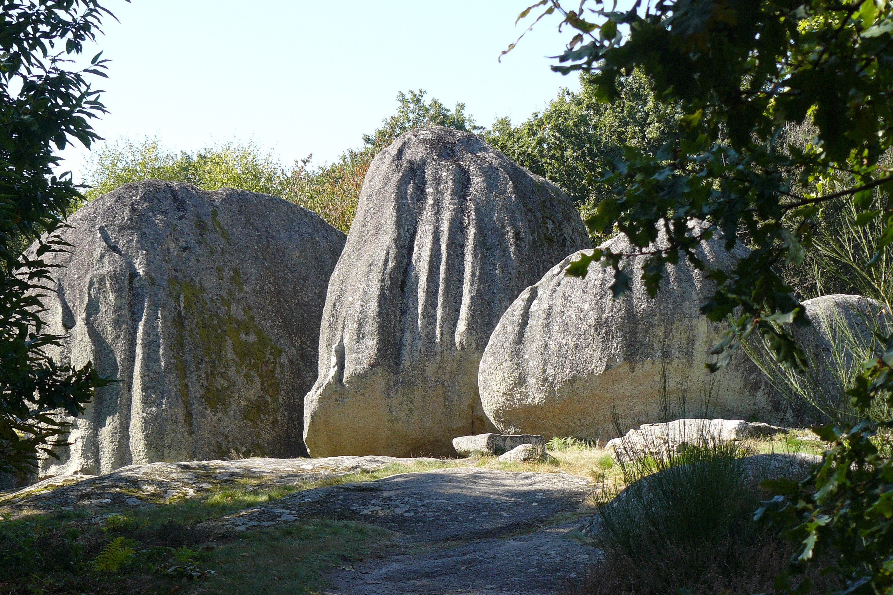 Les Pierres Jaumâtres à Toulx-Sainte-Croix (Creuse, France)